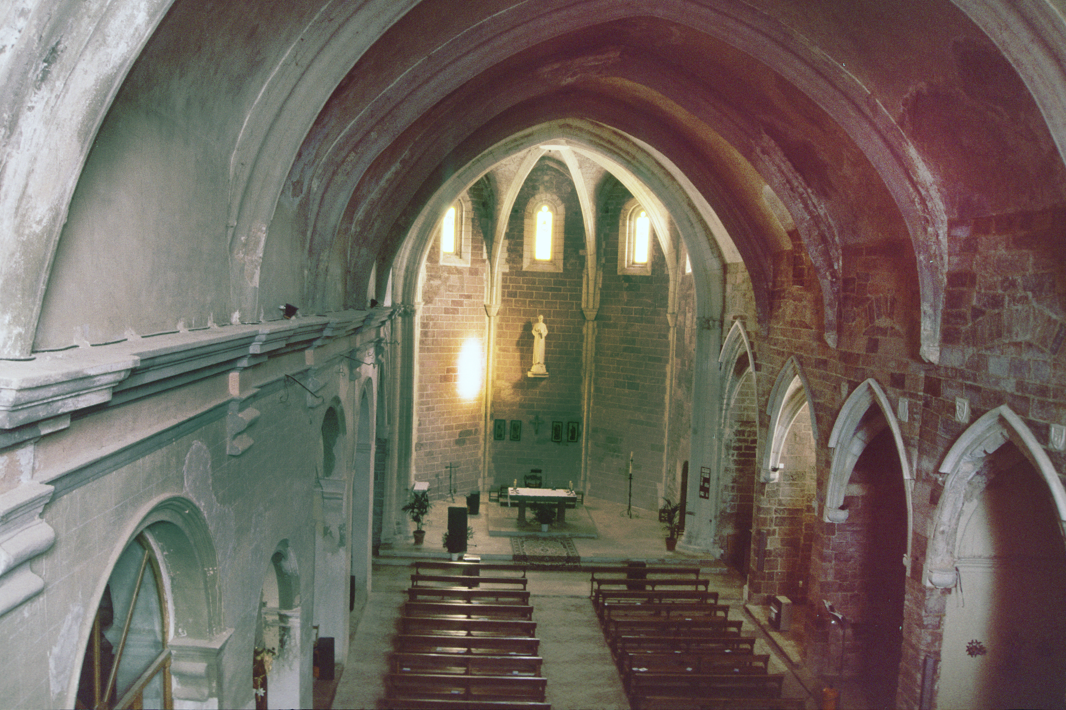 Esglésa parroquial de Santa Maria de Prades (Baix Camp)